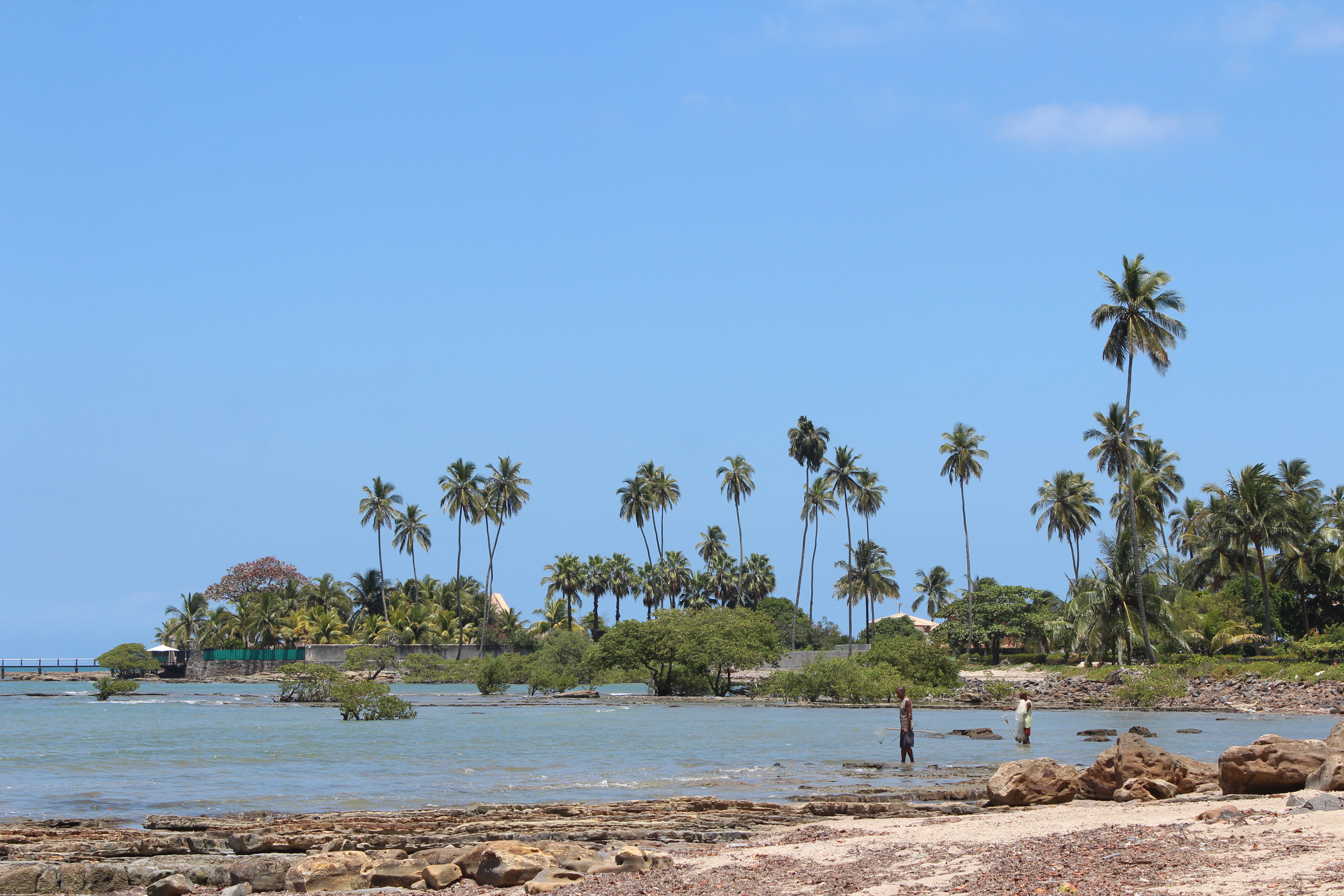 Descrição_para_sua_foto